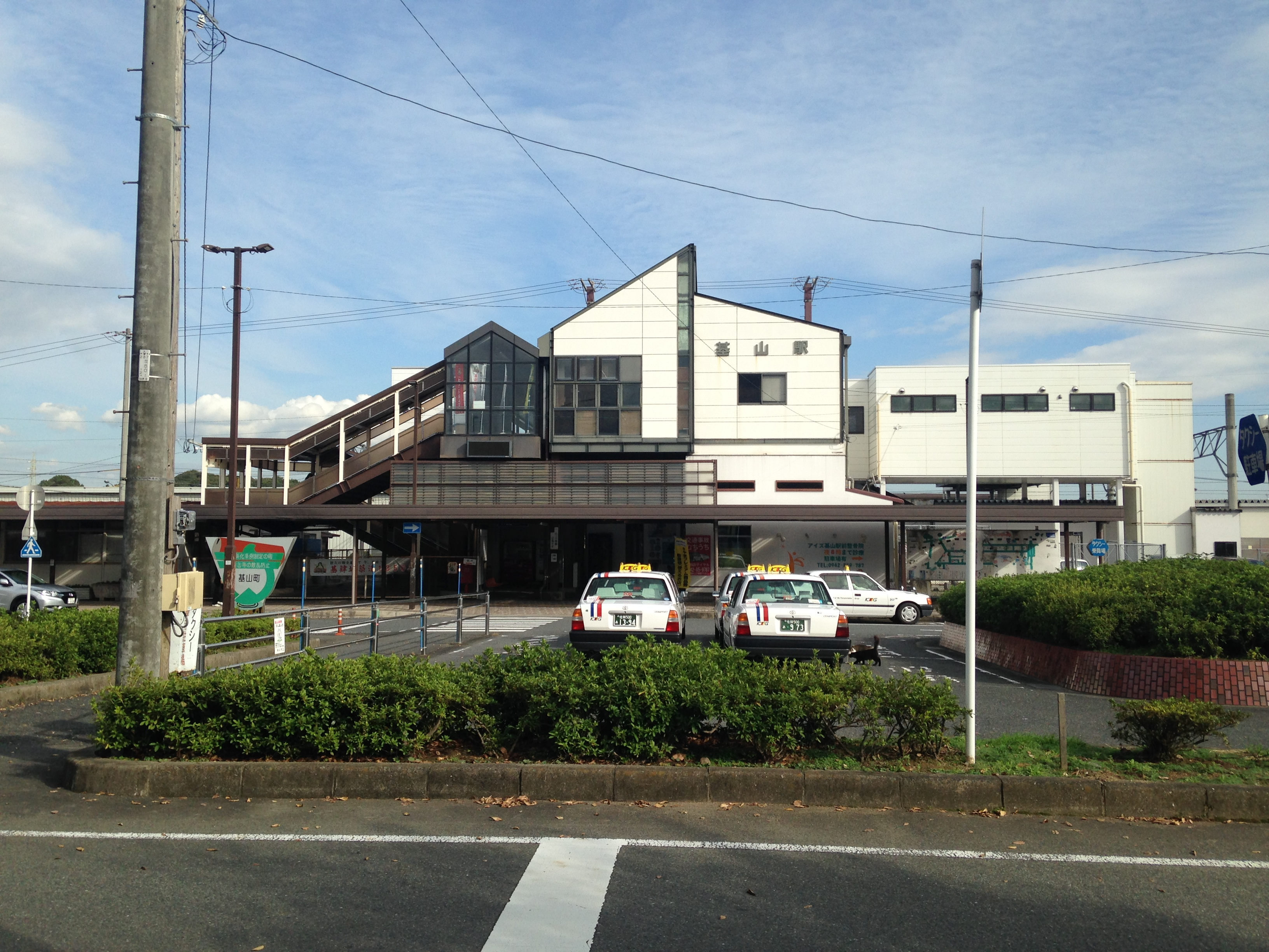 基山駅駅舎の遠景